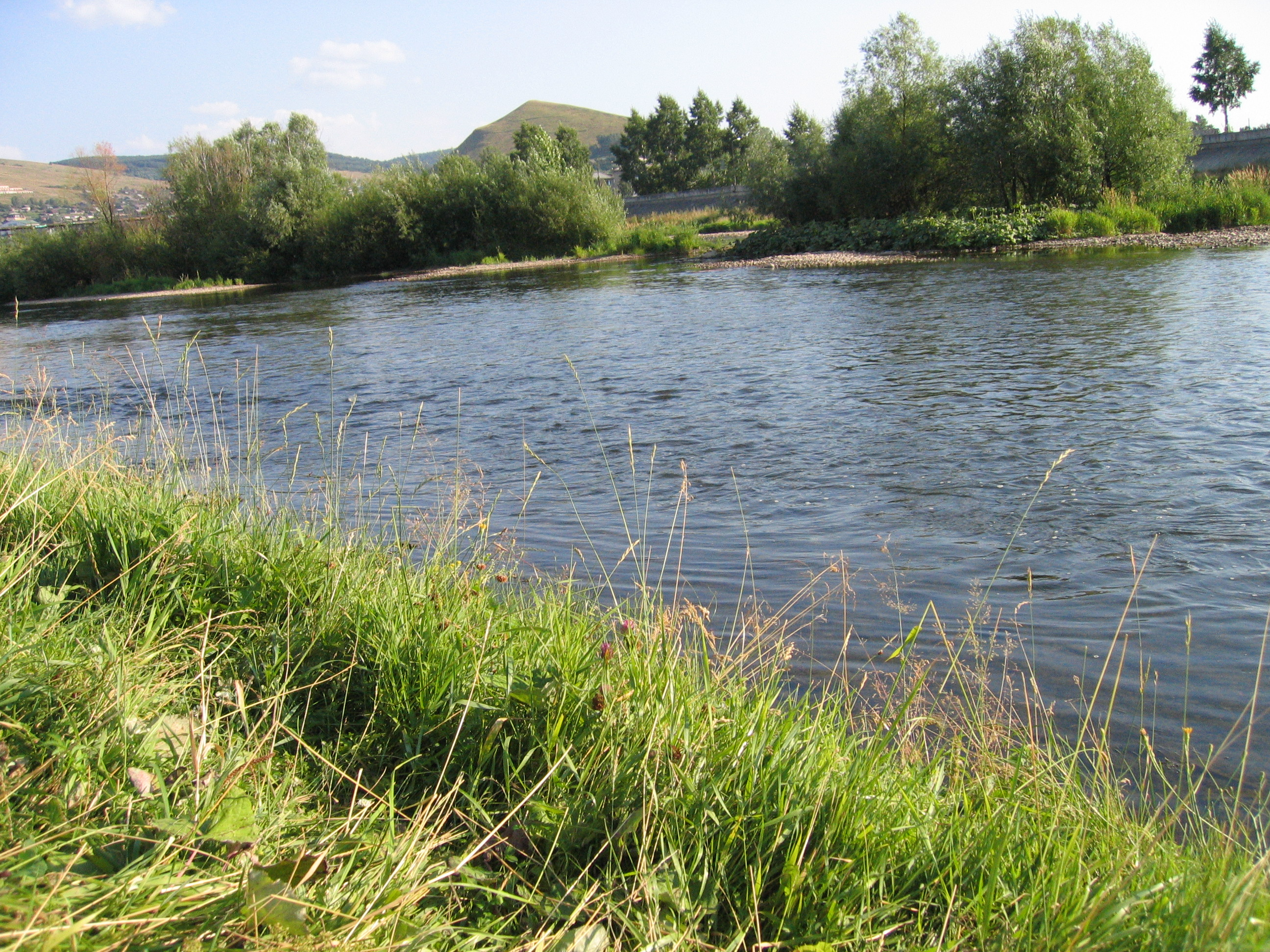 Река Юрюзань, протекающая в исторической части Усть-Катава